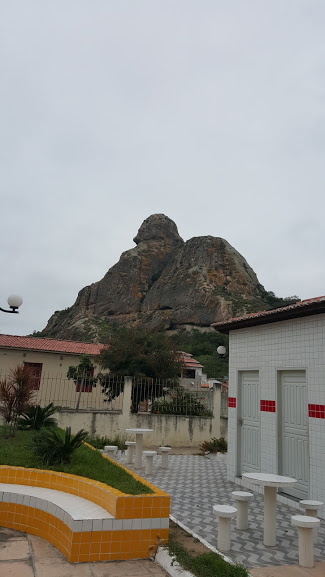 Serra do Leão do fundo, visto a partir da praça Rui Barbosa.